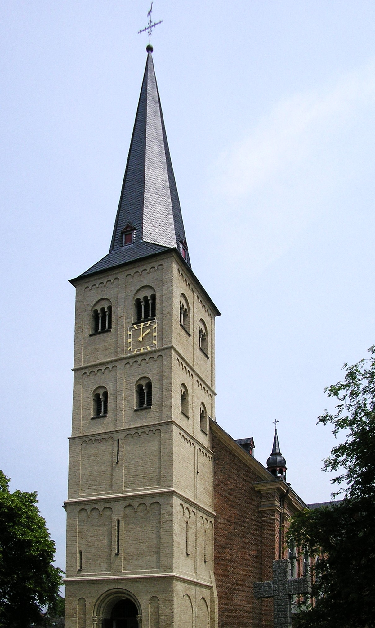 St. Stephanus zu Grevenbroich-Elsen